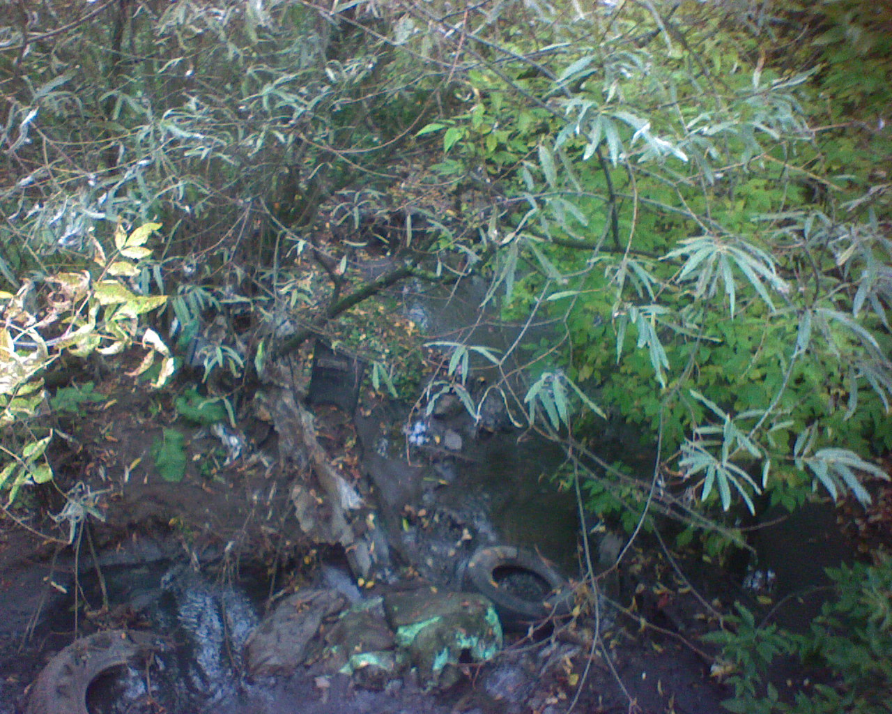 Река Рахма (загрязнение). Рядом с истоком.